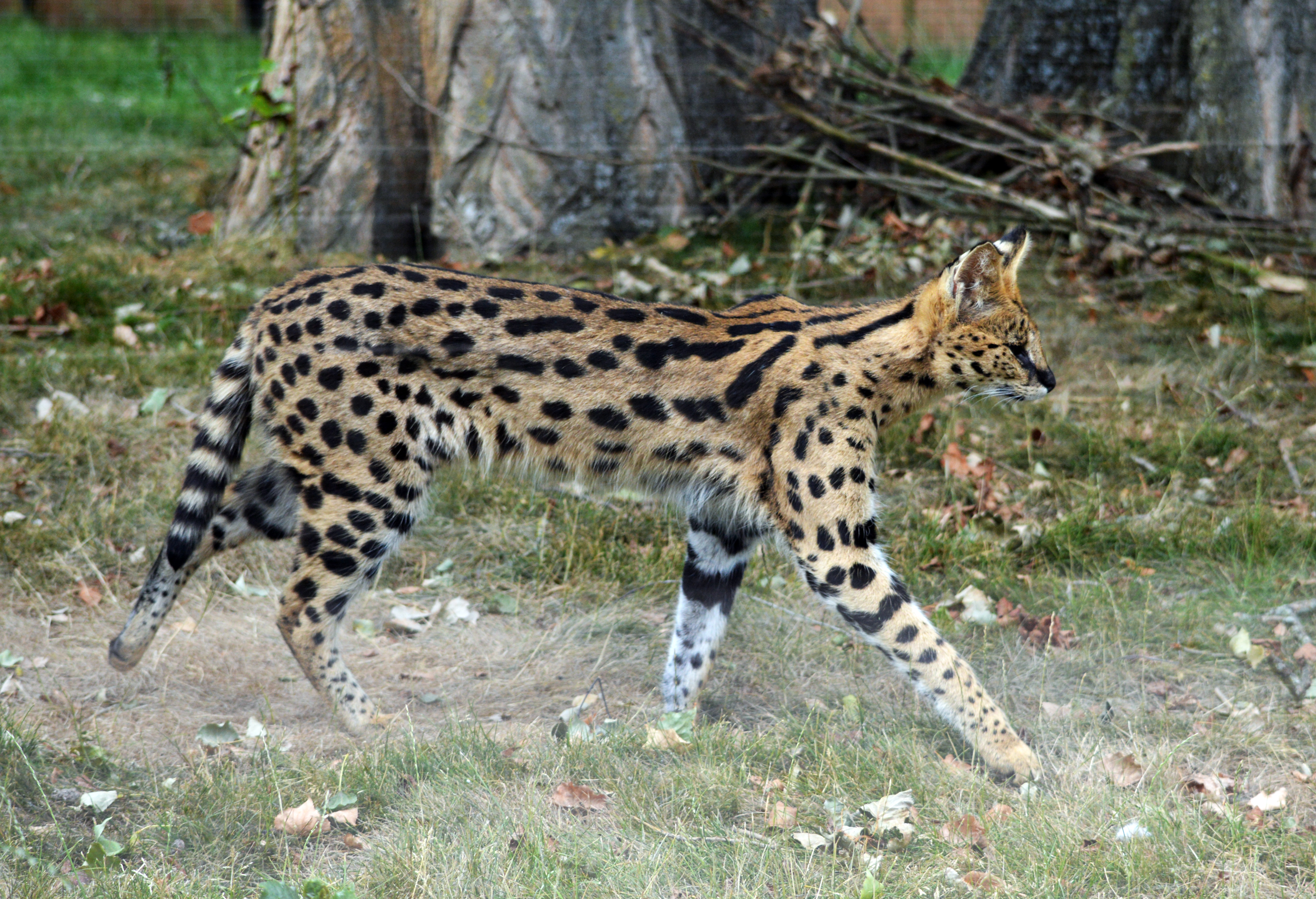 Splash